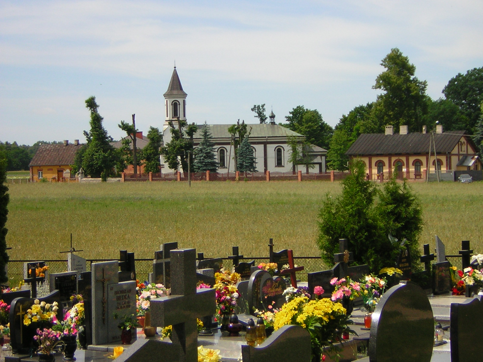 Karol